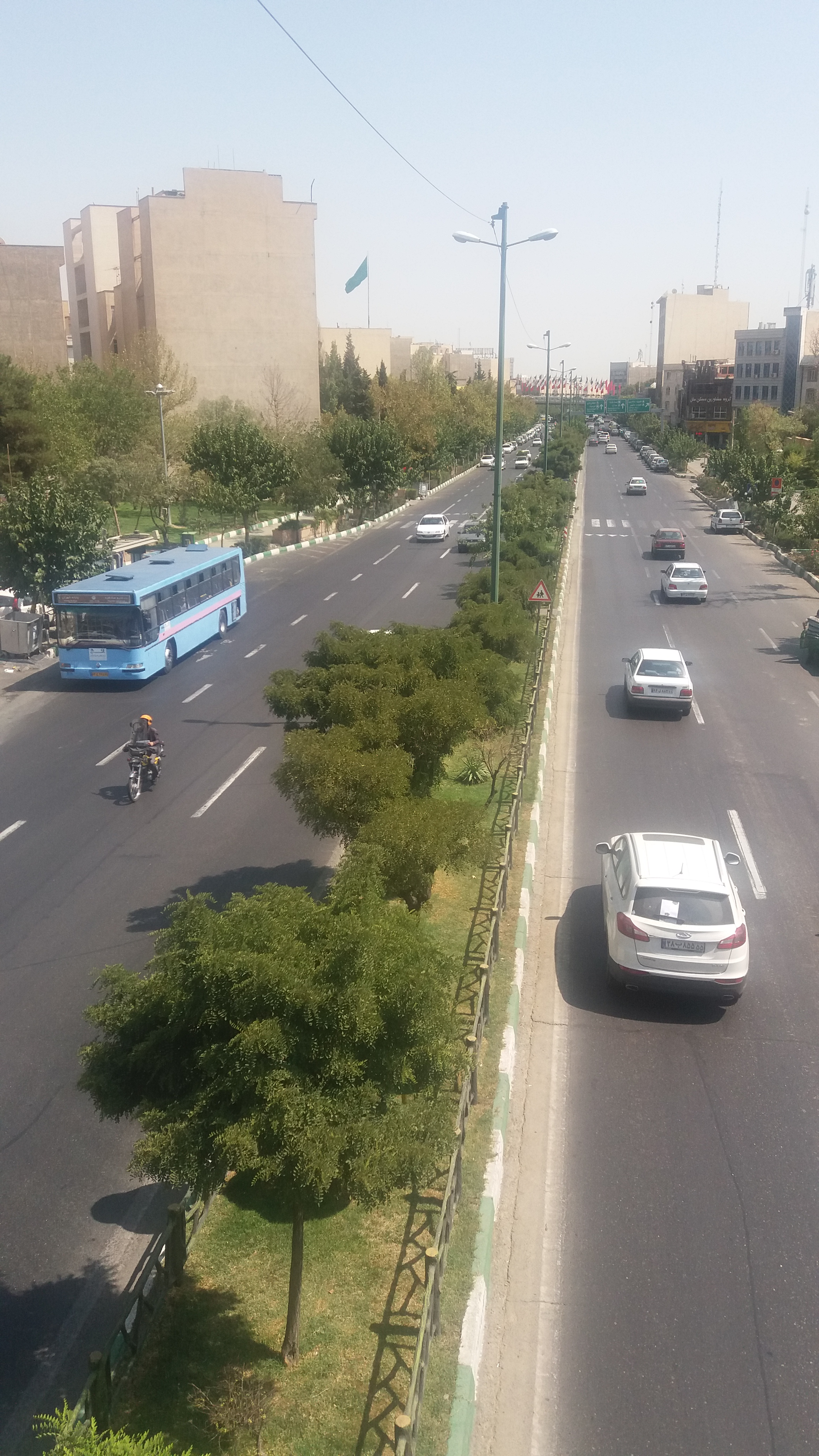 بزرگراه آیت‌الله کاشانی - تهران - ۱۳۹۵